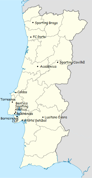 Carte des clubs participants du championnat du portugal de football de première division 1955-1956